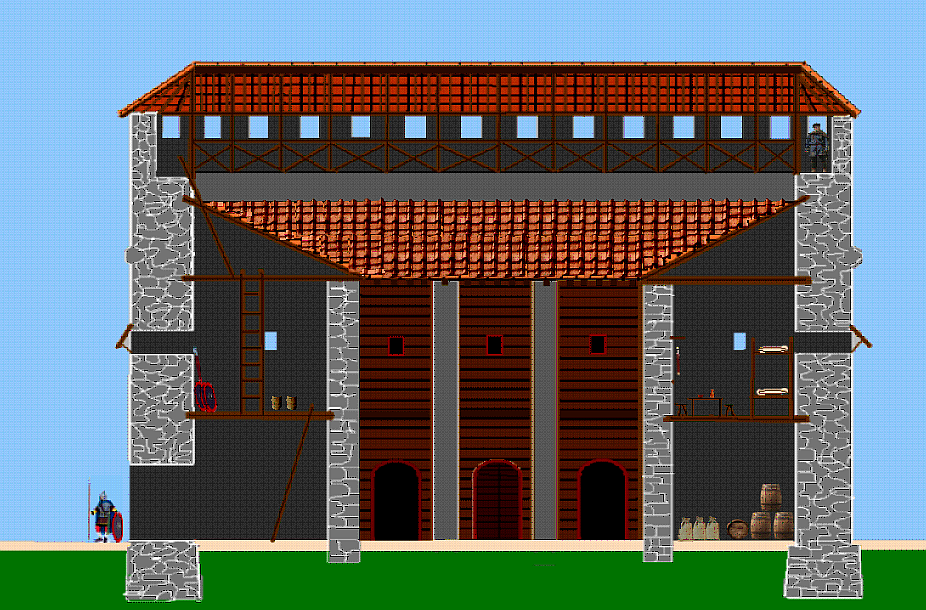 Schnittzeichnung des spätrömischen Restkastells von Wallsee (A).